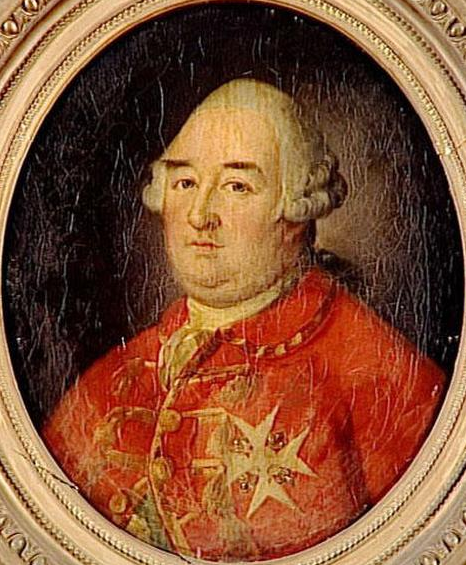 Louis Philippe d'Orléans (1725-1785), Duke of Orléans, Prince du sang